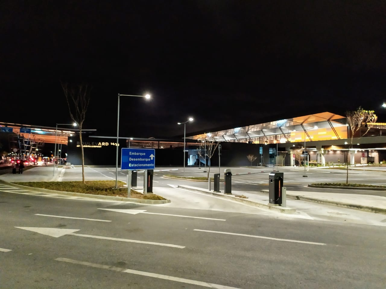 Aeroporto Internacional de Florianópolis inaugurado no segundo semestre de 2019.